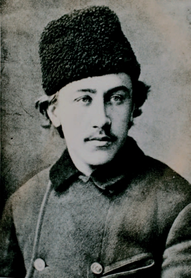 Борис Грінченко - народний учитель.: Борис Грінченко - народний учитель. Фото 1883 року.